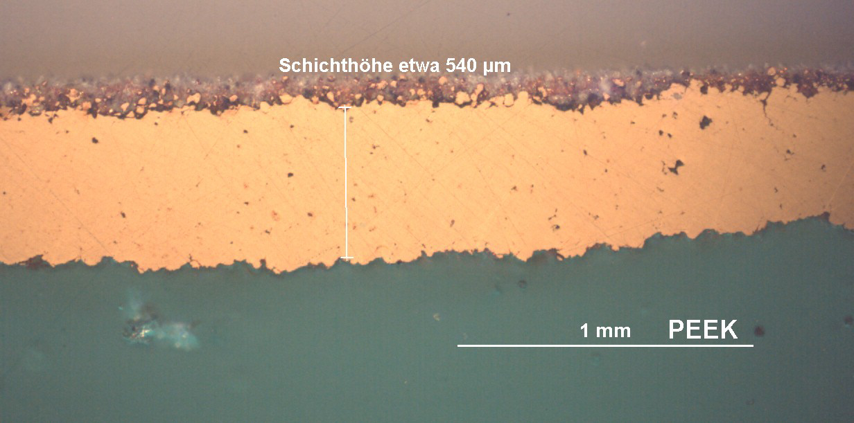 thermisch-kinwtisch erzeugte Schicht auf PEEK